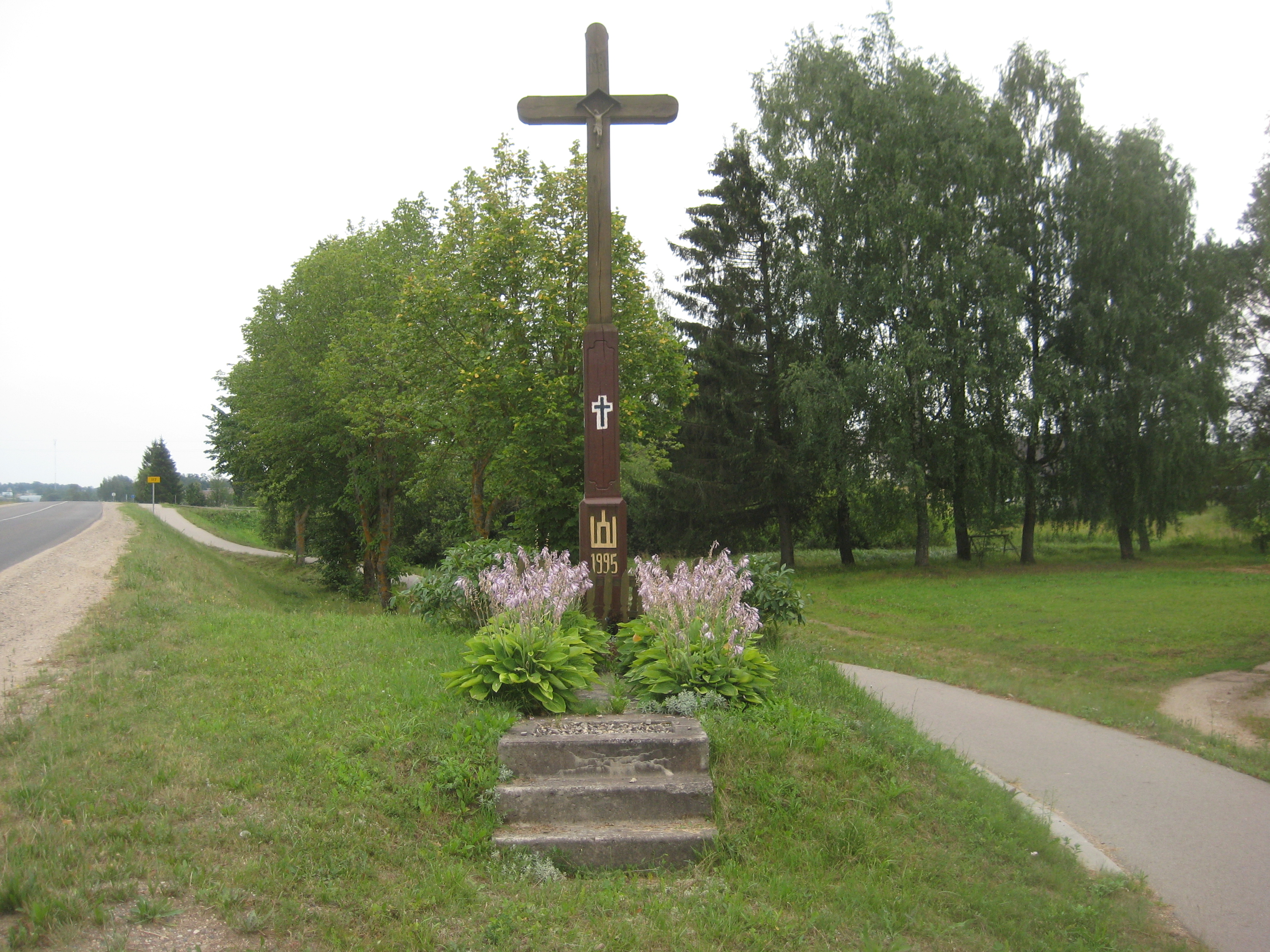 Antanašė 42223, Lithuania